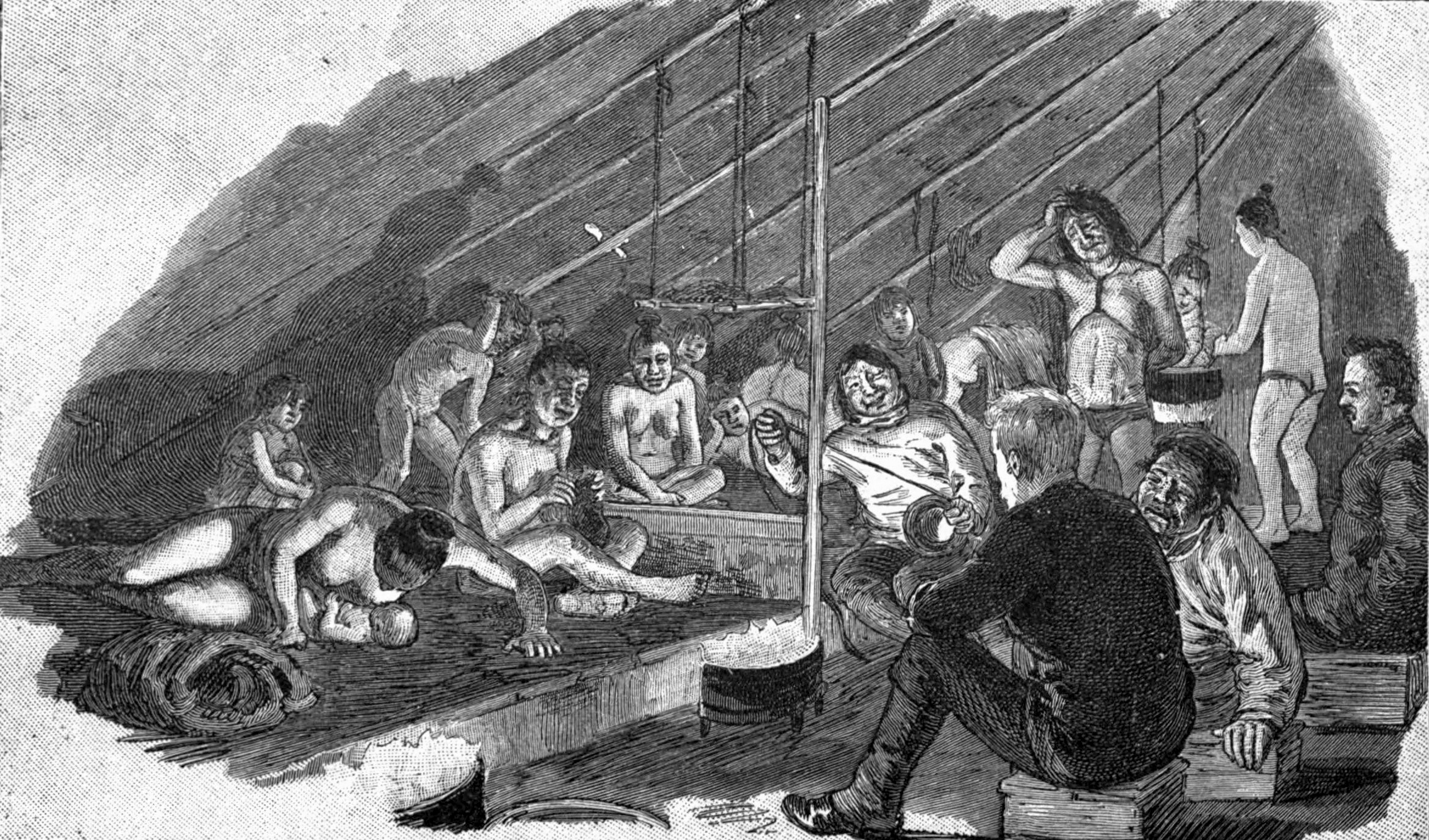 Участники гренландской экспедиции Нансена в гостях у эскимосов.